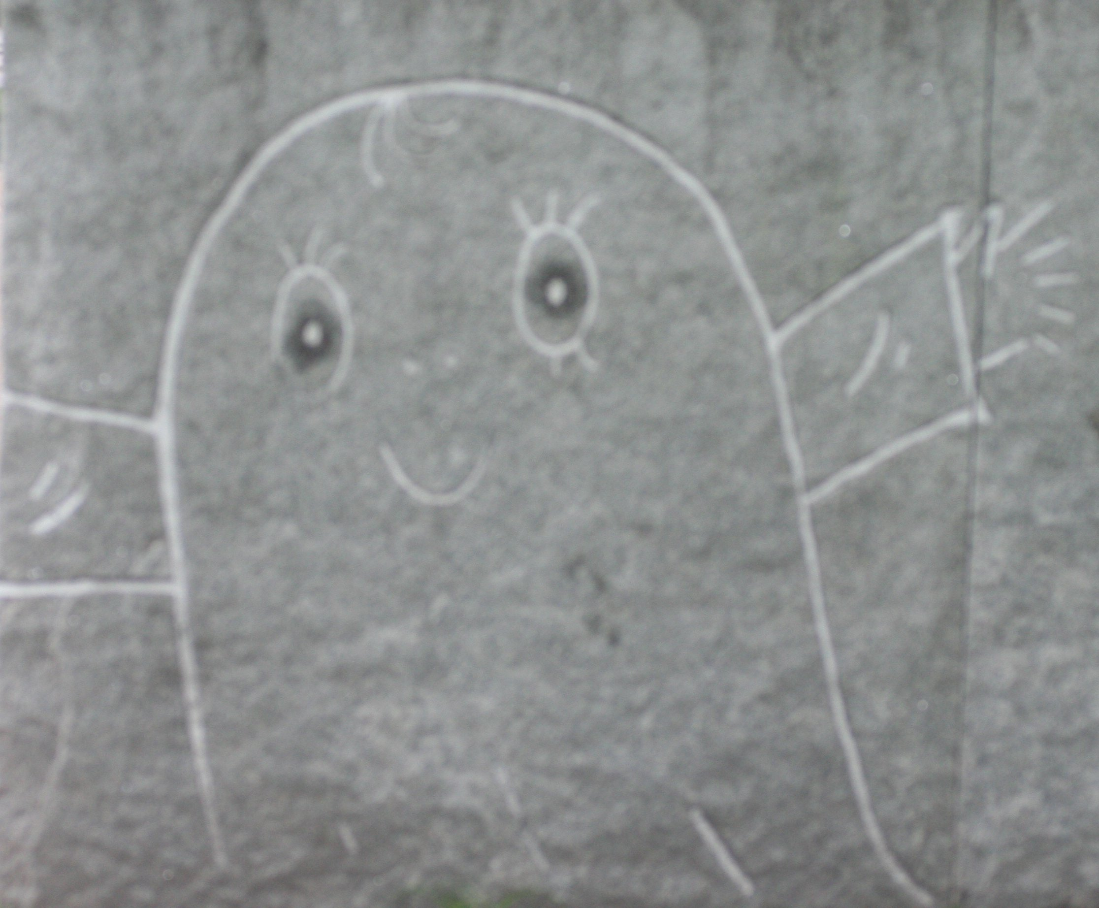 Lilla spöket Laban, kort på offentlig konst i en lekpark på Sandgrund i Karlstad